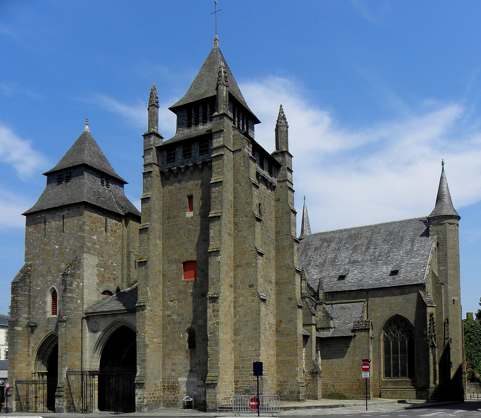 Façade occidentale et flanc sud de la nef de la cathédrale Saint-Étienne de Saint-Brieuc (22).